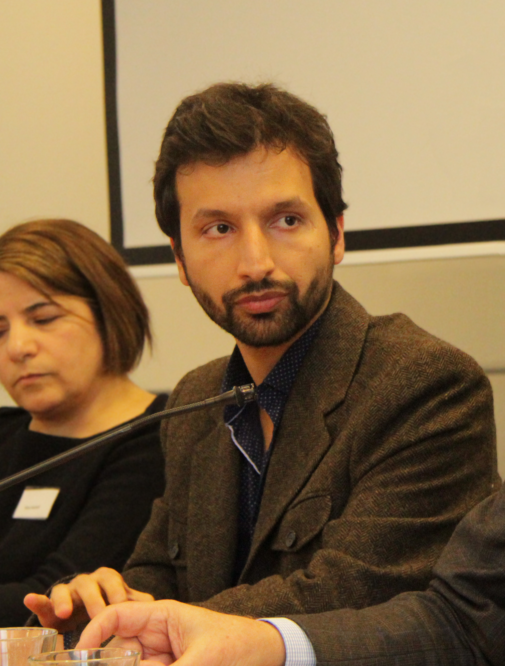 Peyman Jafari (onderzoeker en publicist) bij het debat over Iran: nucleaire dreiging en internationale respons.